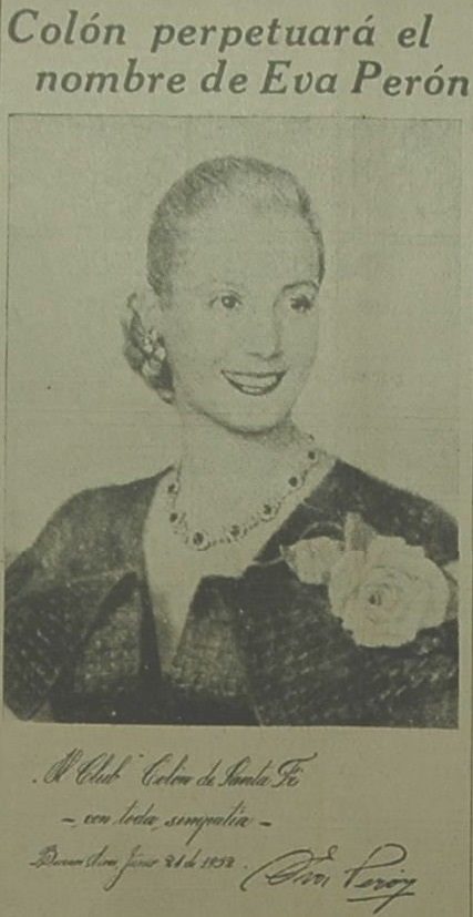 Fotografía de Eva Perón dedicada al Club Atlético Colón